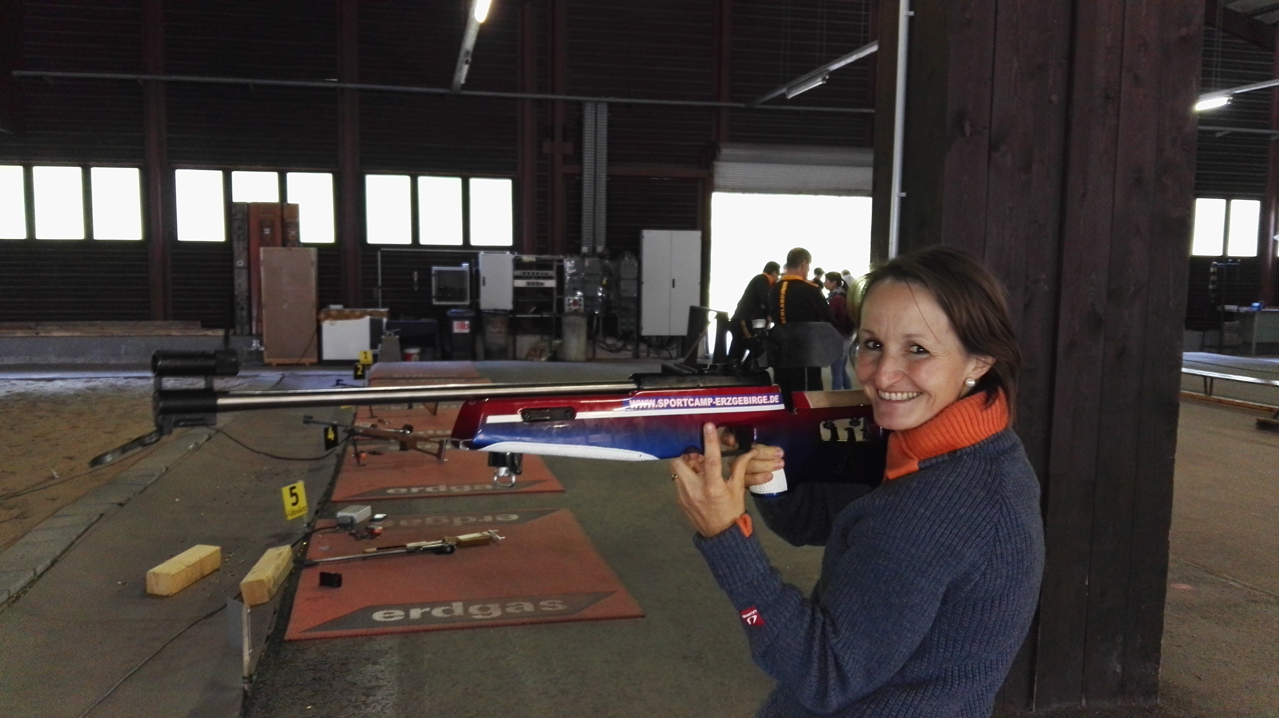 Biathletin Katja Wüstenfeld